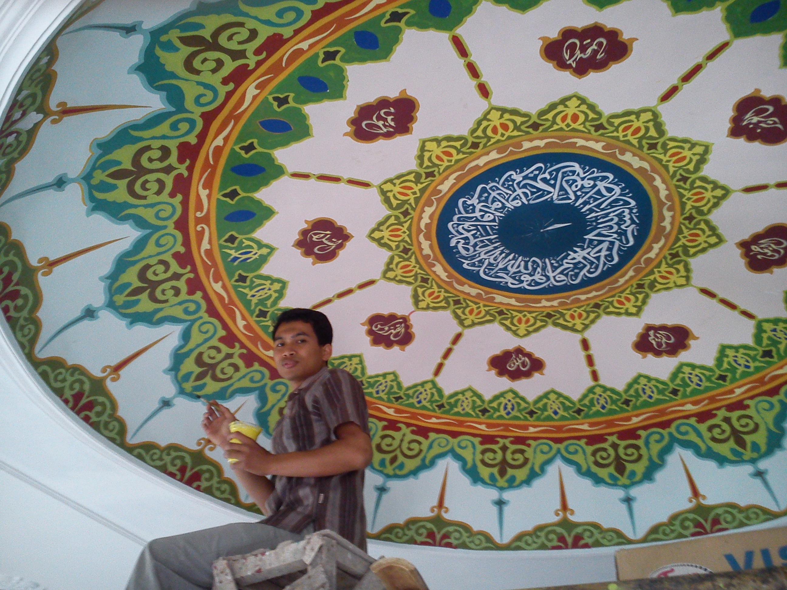 Kaligrafi Masjid di Masjid Ciaul Sukabumi